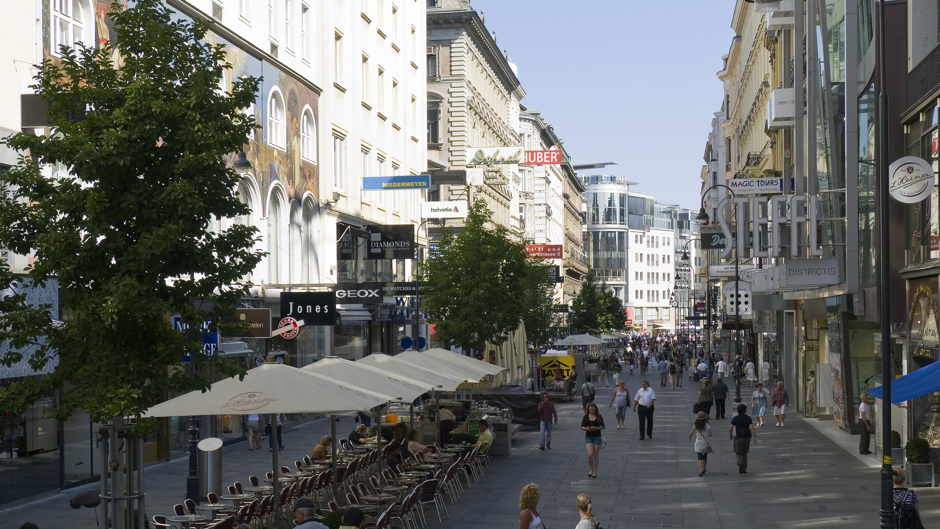 Kärntner Straße in Wien 1 bei Nr. 18 Richtung Norden